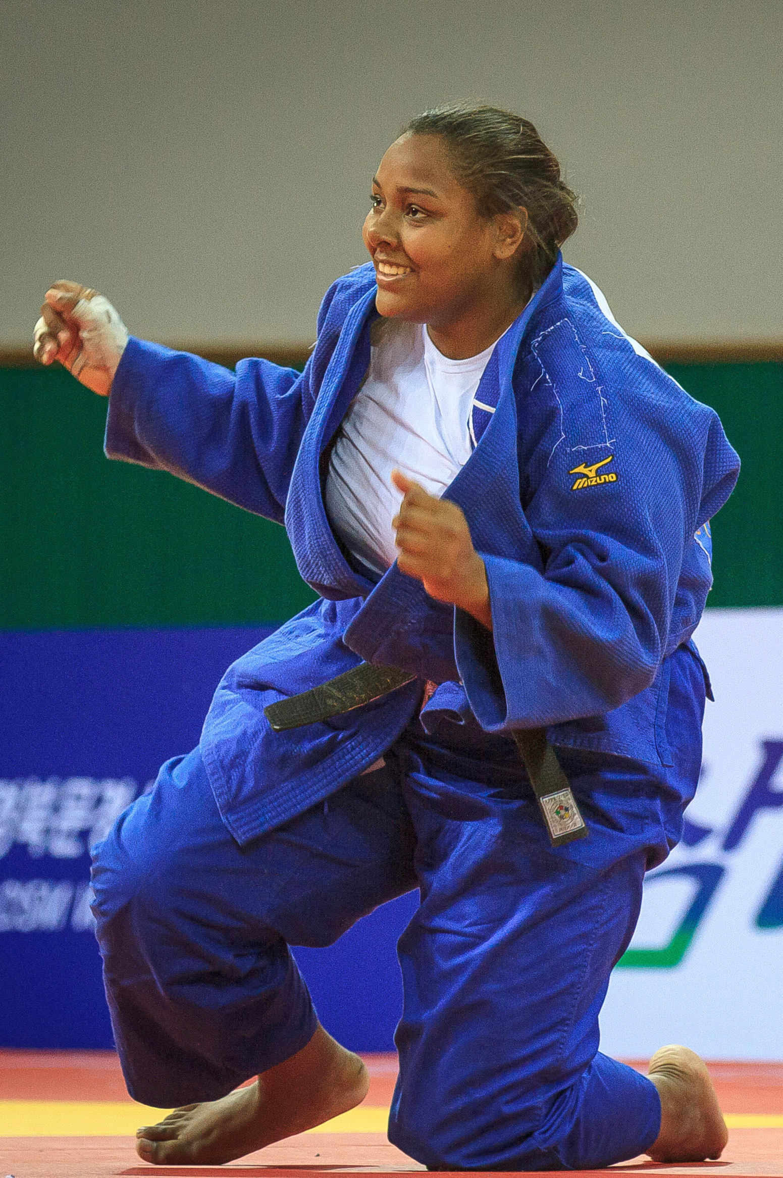 Rochele Jesus conquista uma medalha de bronze para o Brasil no judô individual. Foto: Sgt Johnson Barros